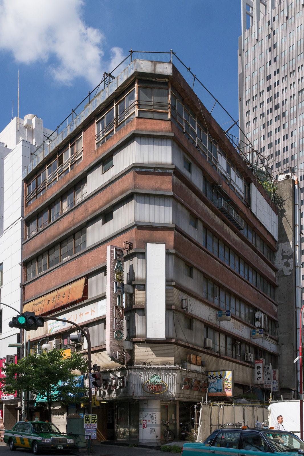 代々木会館、東京都渋谷区代々木。